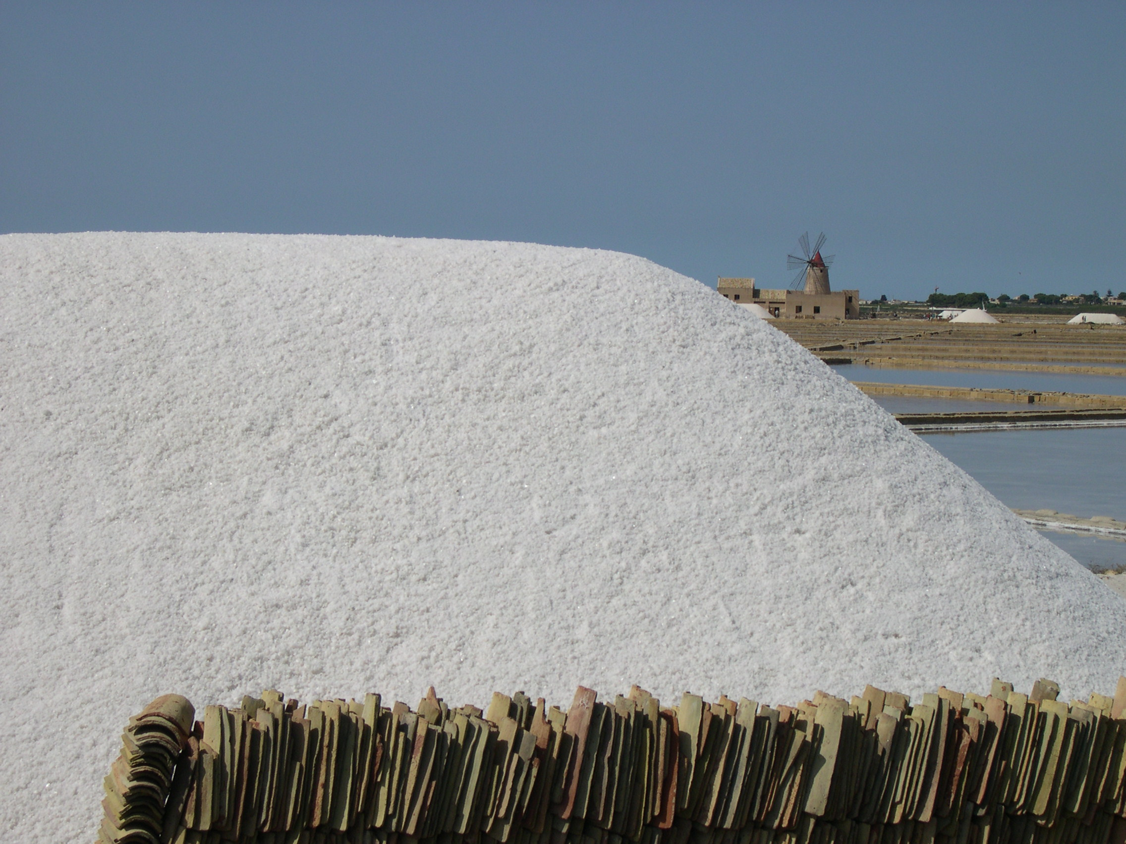 Saline di San Leonardo - Trapani - Italy - August 2005 by Archenzo Queste sono le saline di Marsala. Sullo sfondo si vede la pineta di Mozia.